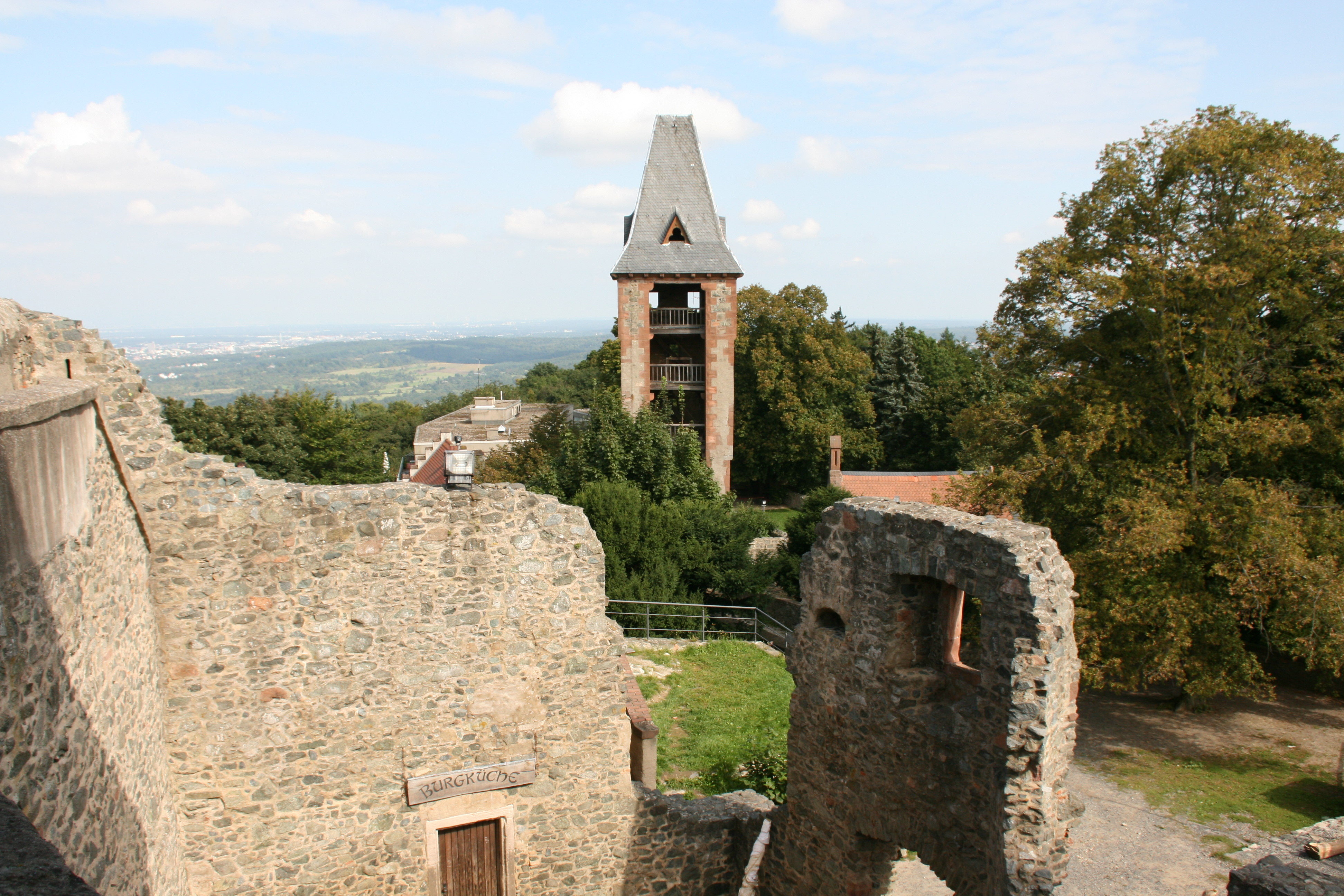 Burg Frankenstein in Mühltal (Hessen)